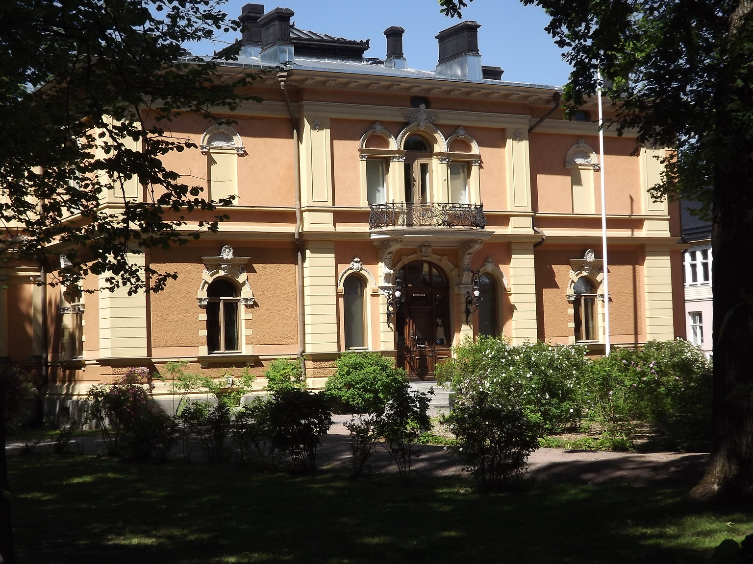 Humanisticum i Åbo, numera inhysande Donnerska institutet och representationsutrymmen för Åbo Akademi.